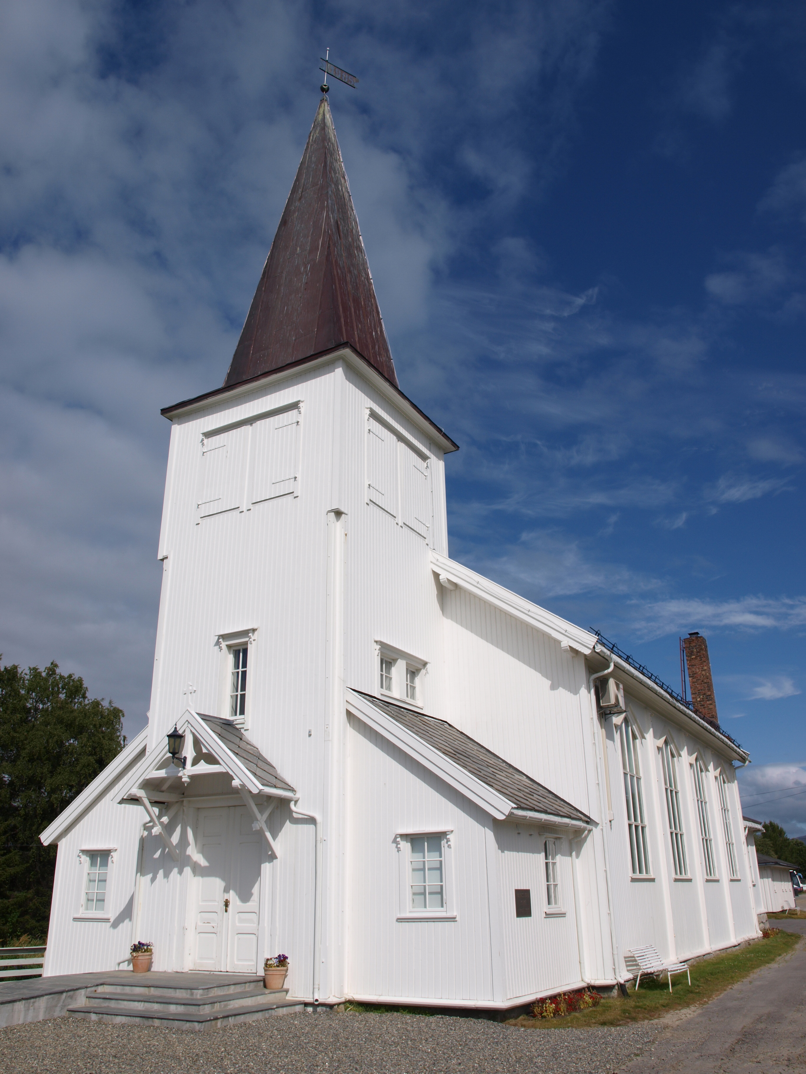 Valnesfjord kyrkje